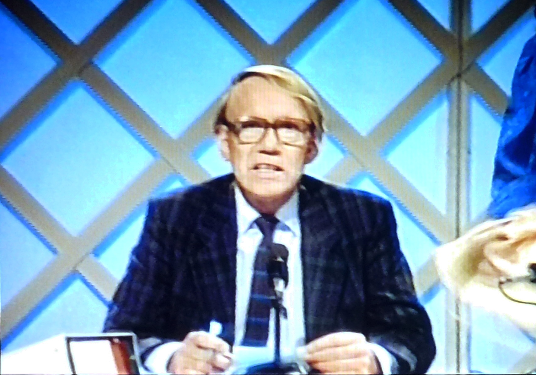 TV-inspelning av programmet "Babbel" på "Vision 86", Stockholmsmässan. Skärmfoto från egen video. Programledare Lennart Swahn.